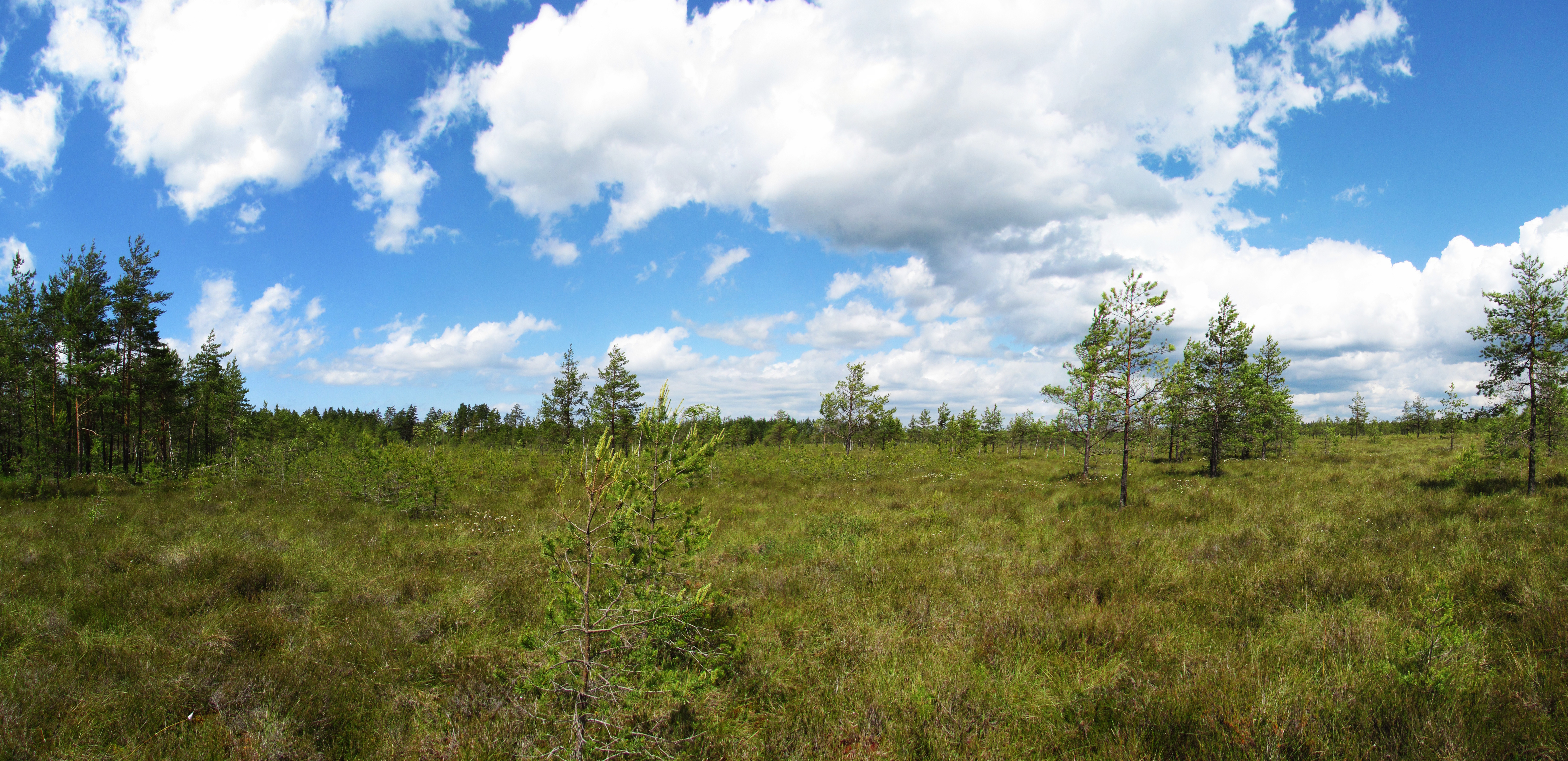 purvs